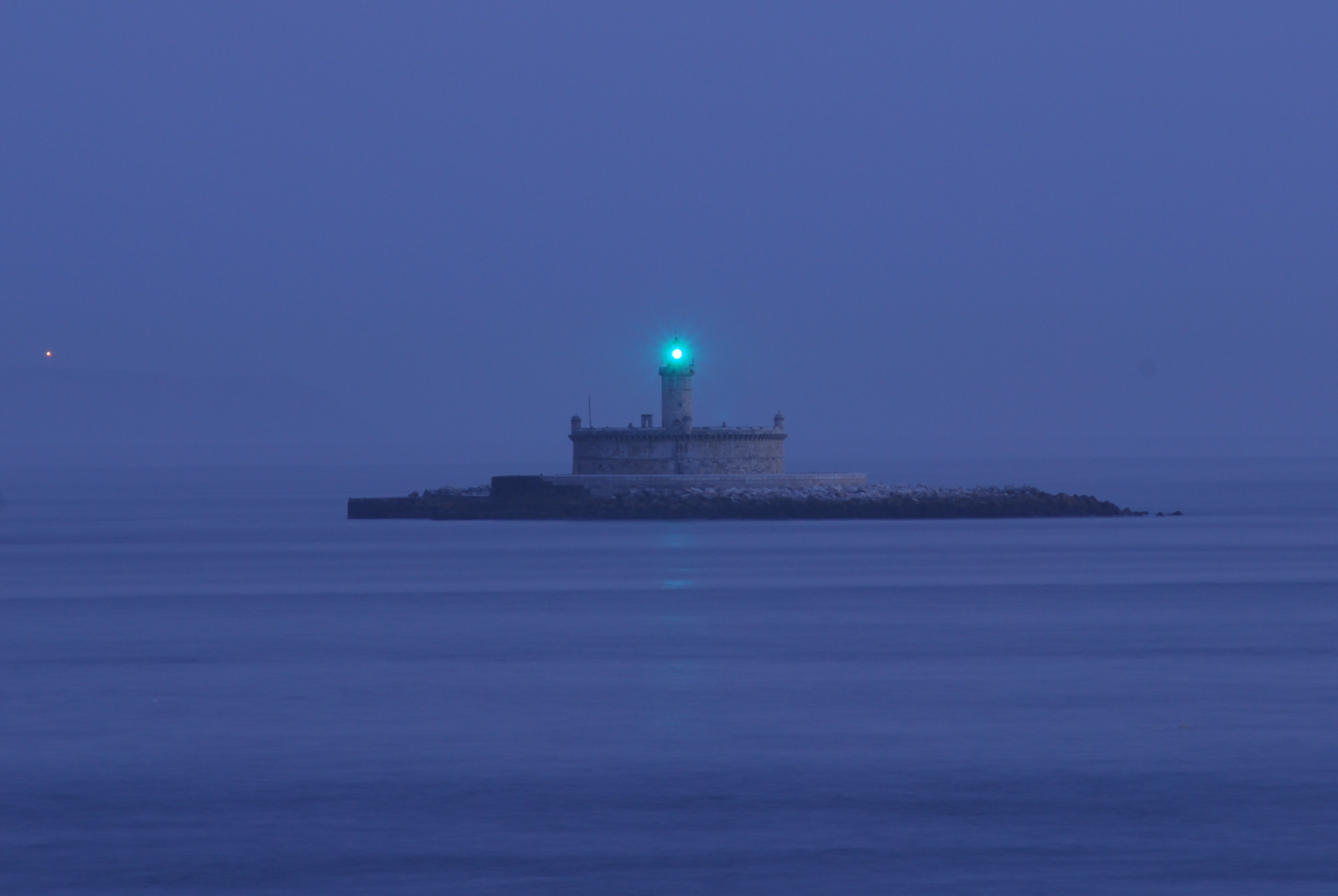 Bugio lighthouse, S. Julião da Barra, Portugal.